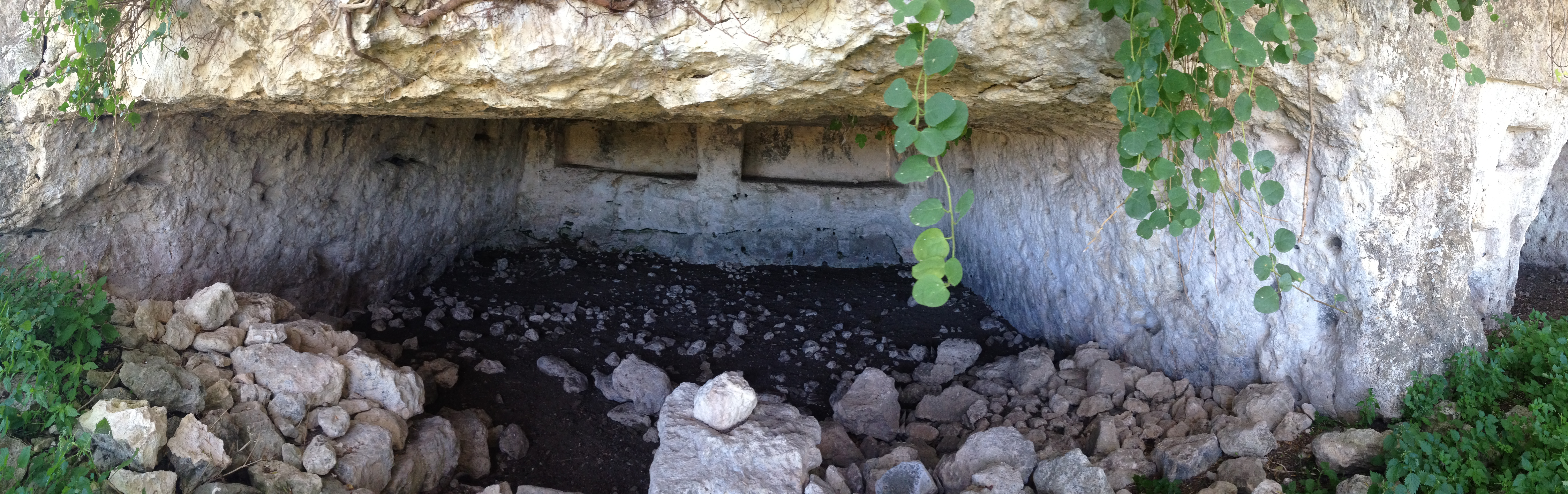 Heeron di Noto Antica